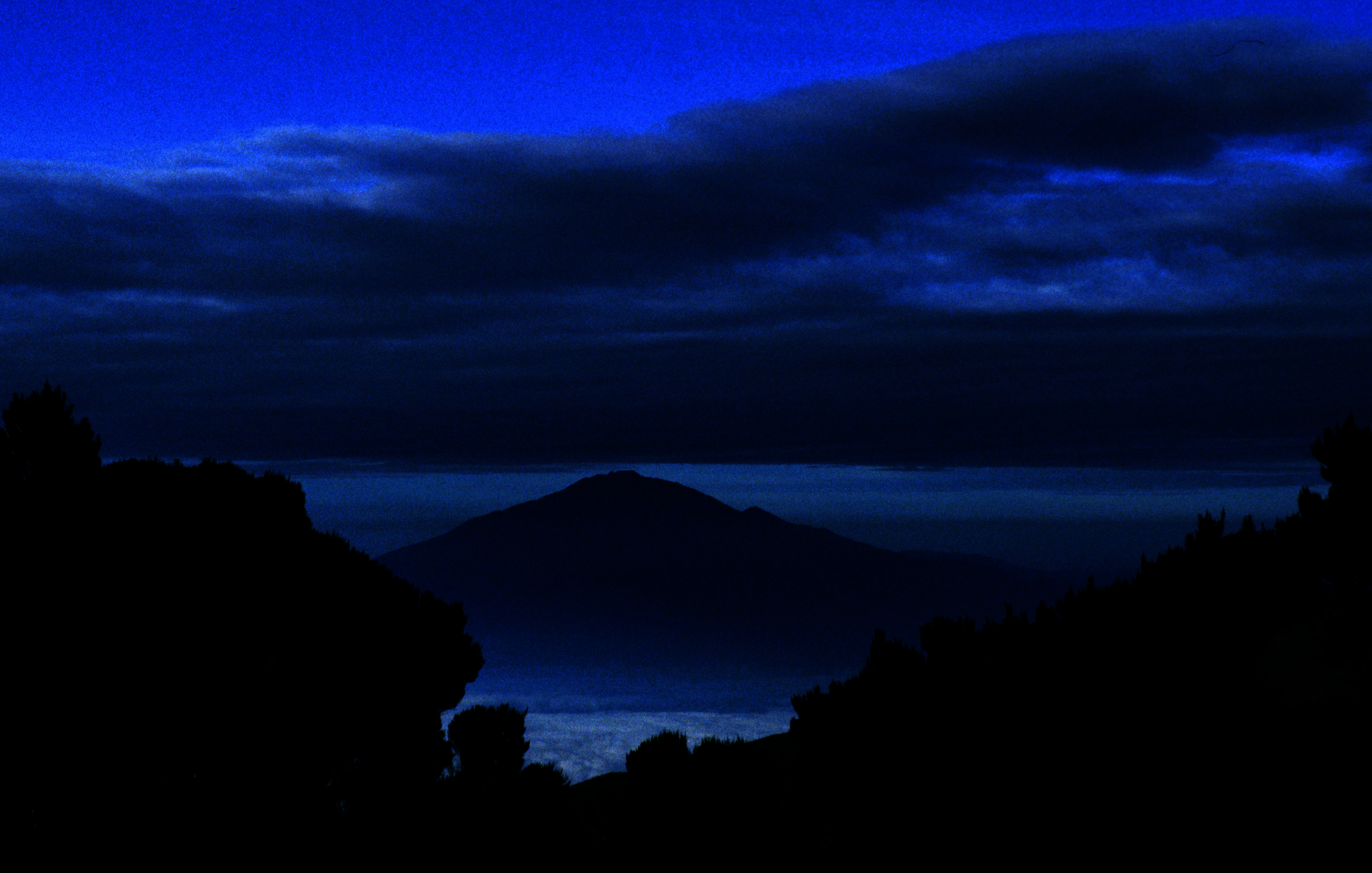 Mount Meru from Kilimanjaromount meru from kilimanjaro